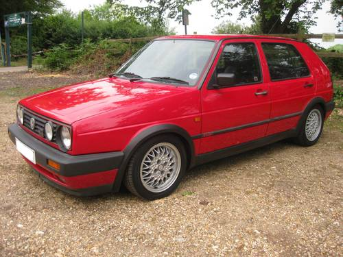 Das Bild zeigt meinen VW Golf II GTI 16V aus dem Modelljahr 1992 in der Ausführung für Großbritannien.